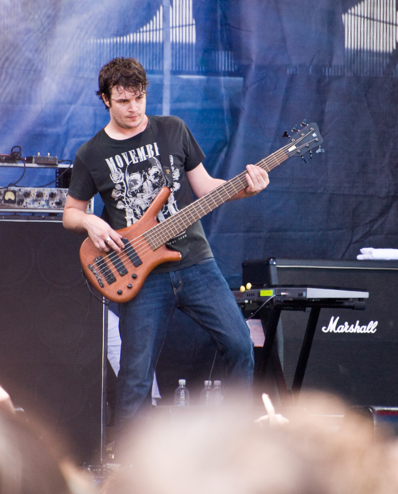 Jon Stockman